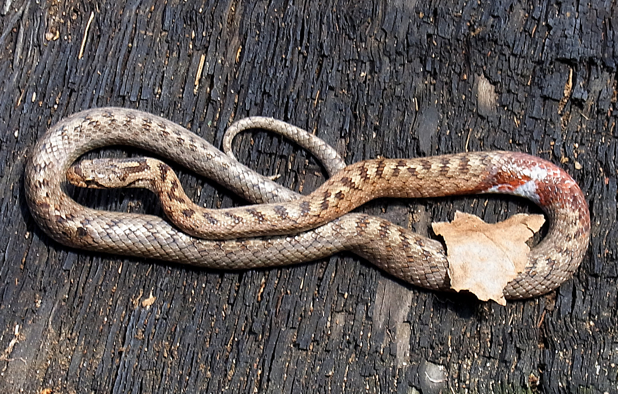 Coronella girondica Nordostspanien östlich Manresa am 30.4.2011